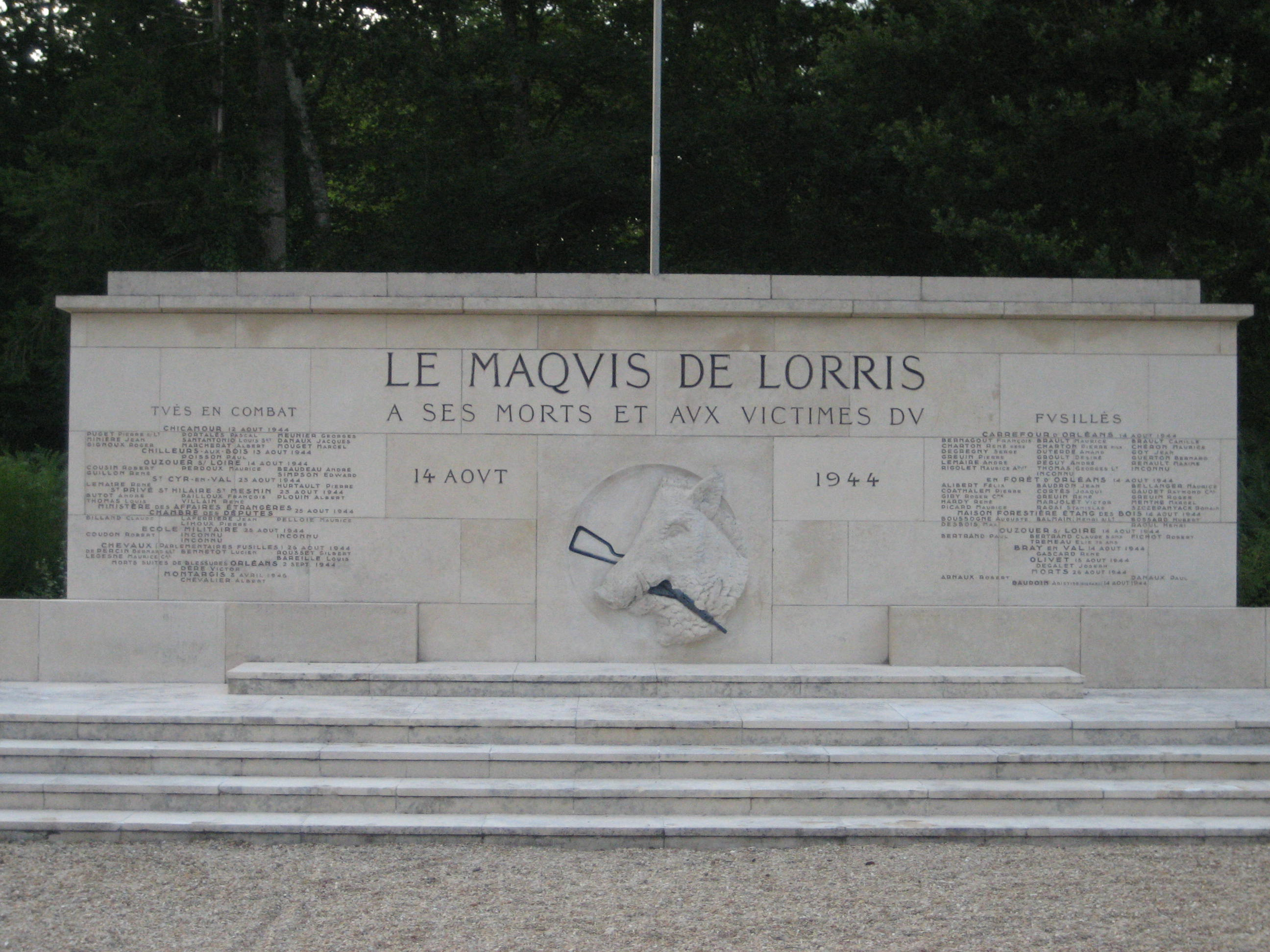 Carrefour de la Résistance, forêt d'Orléans, Loiret, France